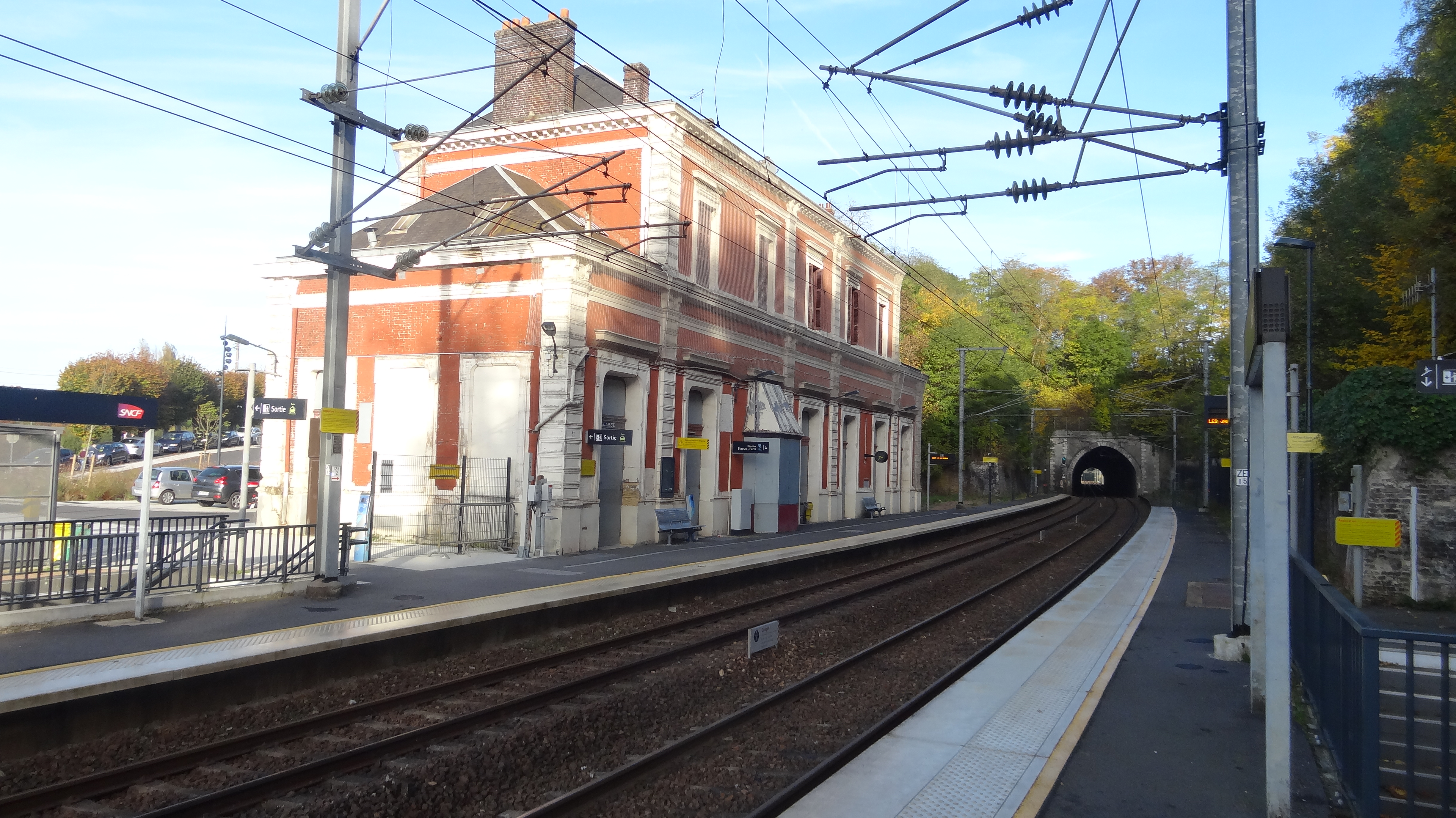 Gare de Conches côté voies ferrées